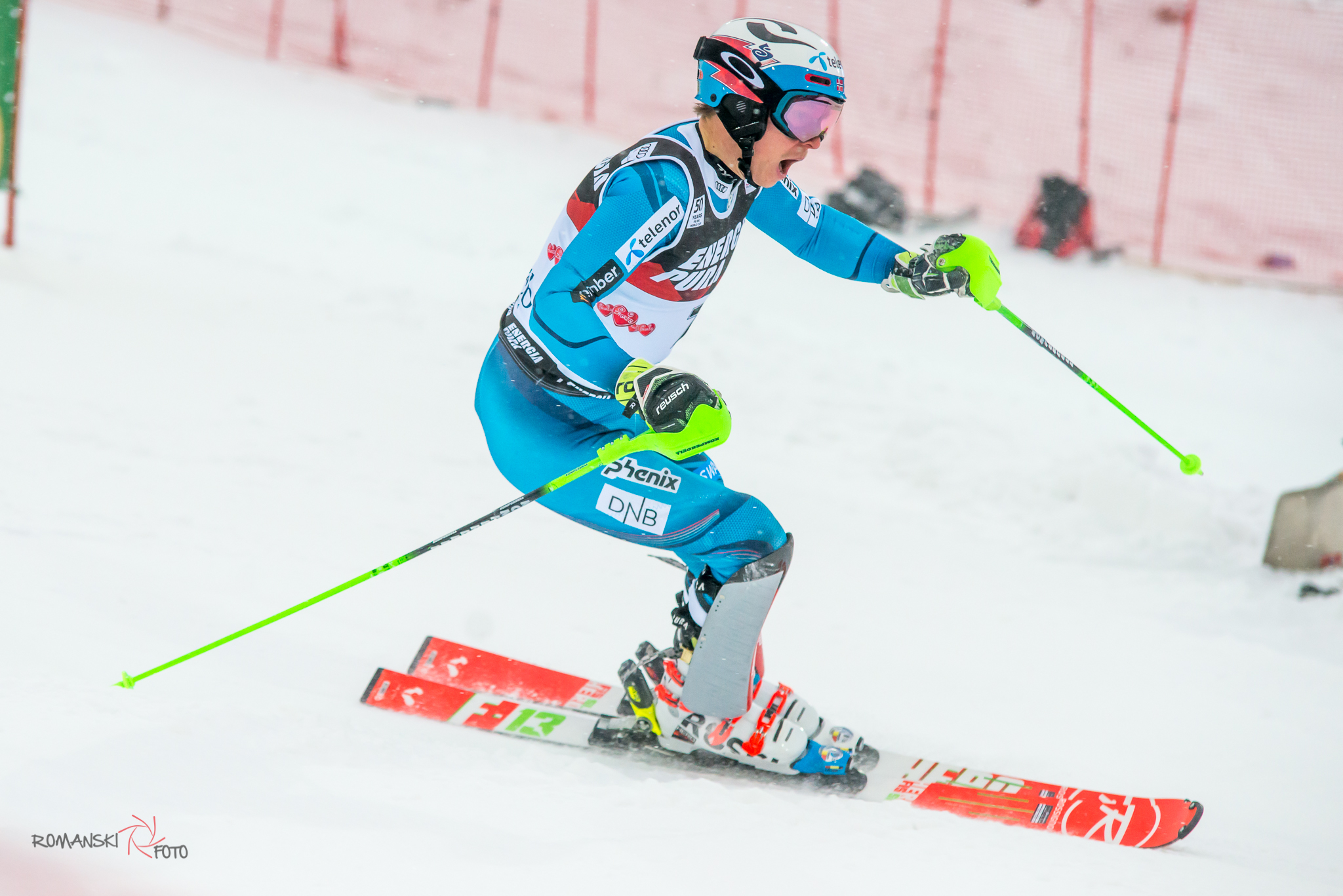 Henrik Kristoferson